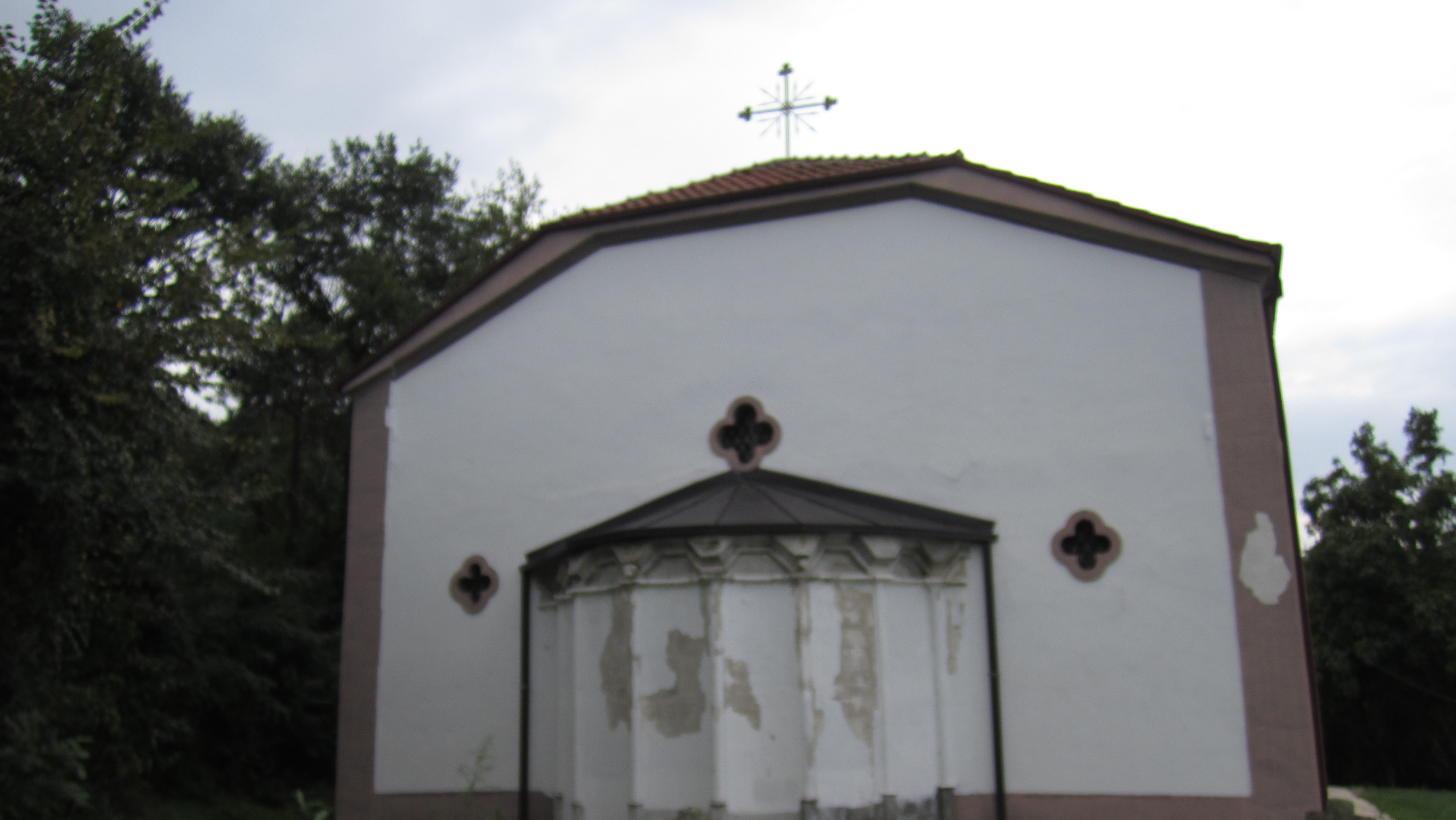 Srpski (latinica): Pečenjevce, Leskovac